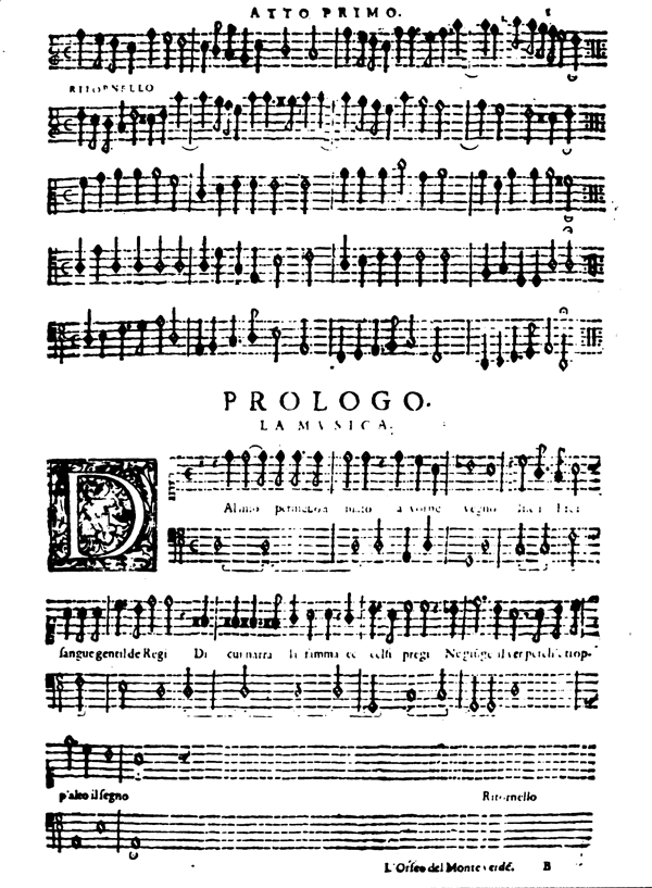 Monteverdi's L'Orfeo, 1609 Venice edition. (Cremona, Biblioteca Governativa)